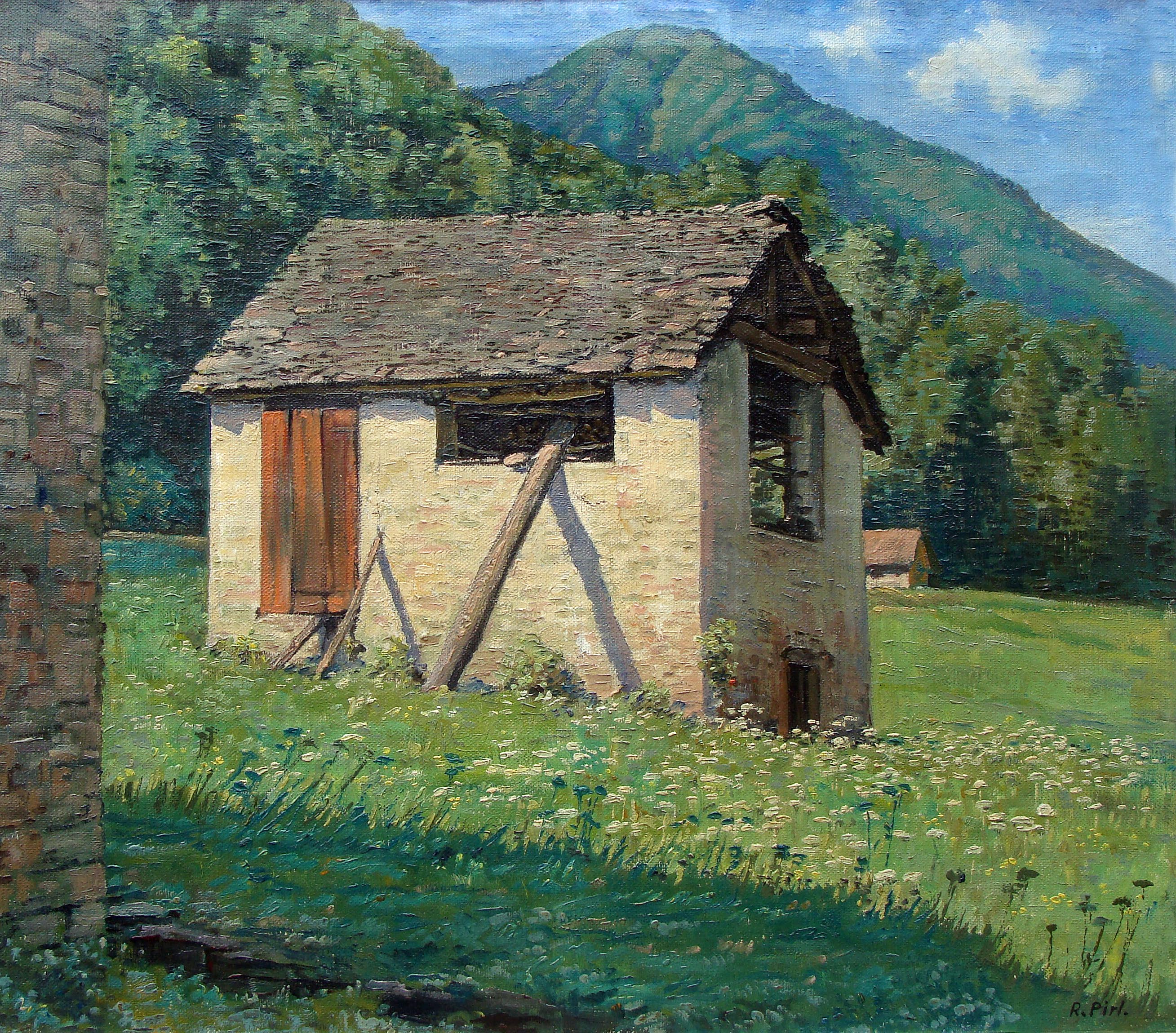 Tableau représentant "Alpage du Tessin avec une ancienne étable" 1948 de Richard Pirl. Collection personnelle.